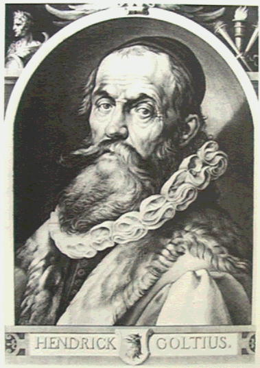 J. Matham (nach Hendrick Goltzius). Selbstporträt von Hendrick Goltzius. Stich.